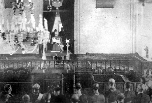 Reza Chah inaugurant le nouveau Parlement, vers 1939